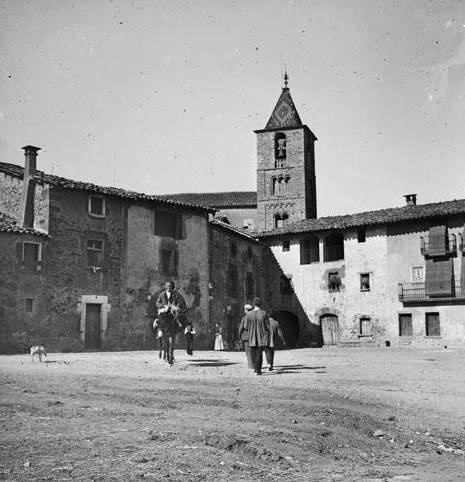 Imatge